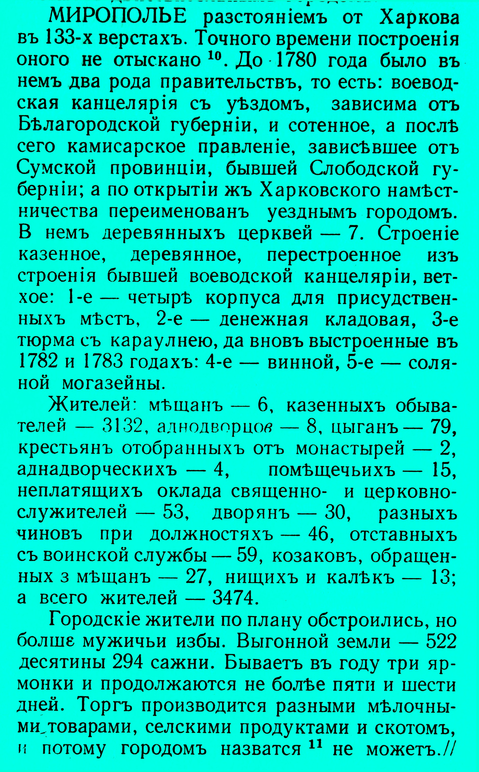 Уездный город Мирополье. Описание городов Харьковского наместничества 1796 года.